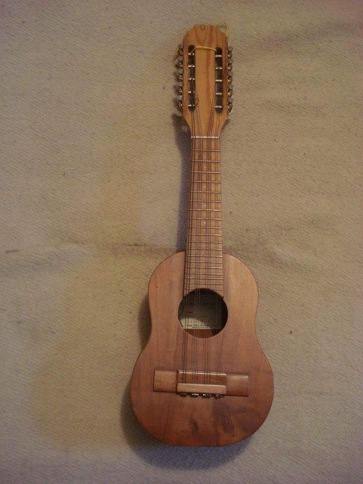 Replica del Requintillo, florinda, chinita o tiple grillo, instrumento del siglo XIX del cual deriva el Bandolin Tachirense